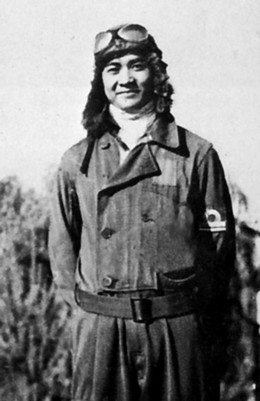 鴛渕孝、鴛淵孝